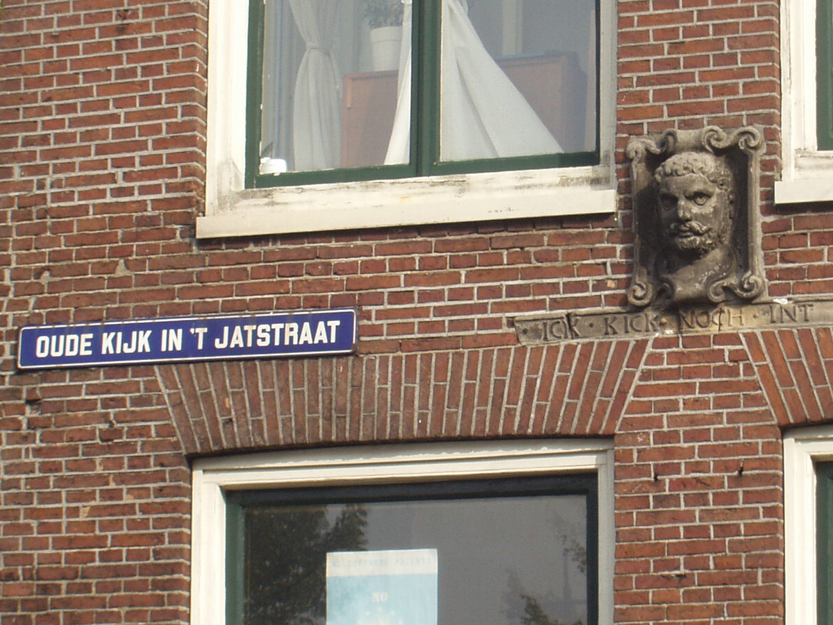 categorie:Afbeelding straatnaambord